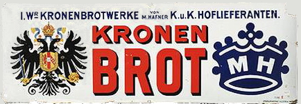 Altes Logo und Reklame von Kronenbrot. "I. Wr. Kronenbrotwerke von M. Hafner, K. und K. Hoflieferanten", mit kaiserlichem Doppeladler. Randst. Emaillierwerke Austria Wien, 55 x 155 cm.